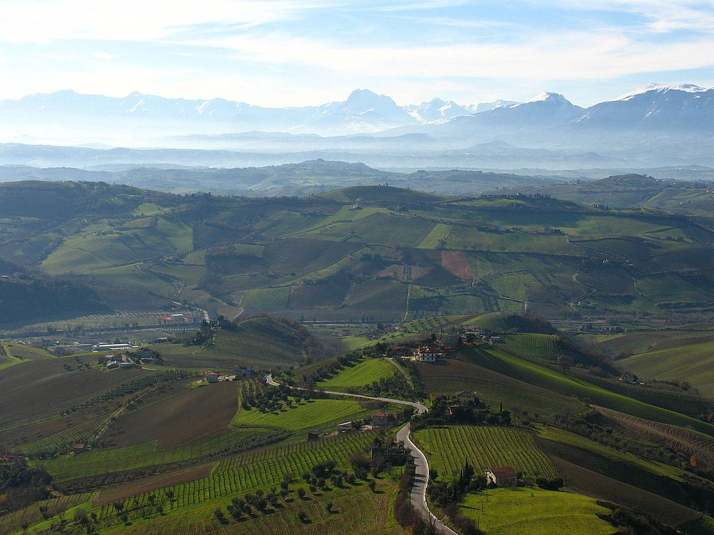 Ripatransone, Marche, Italia